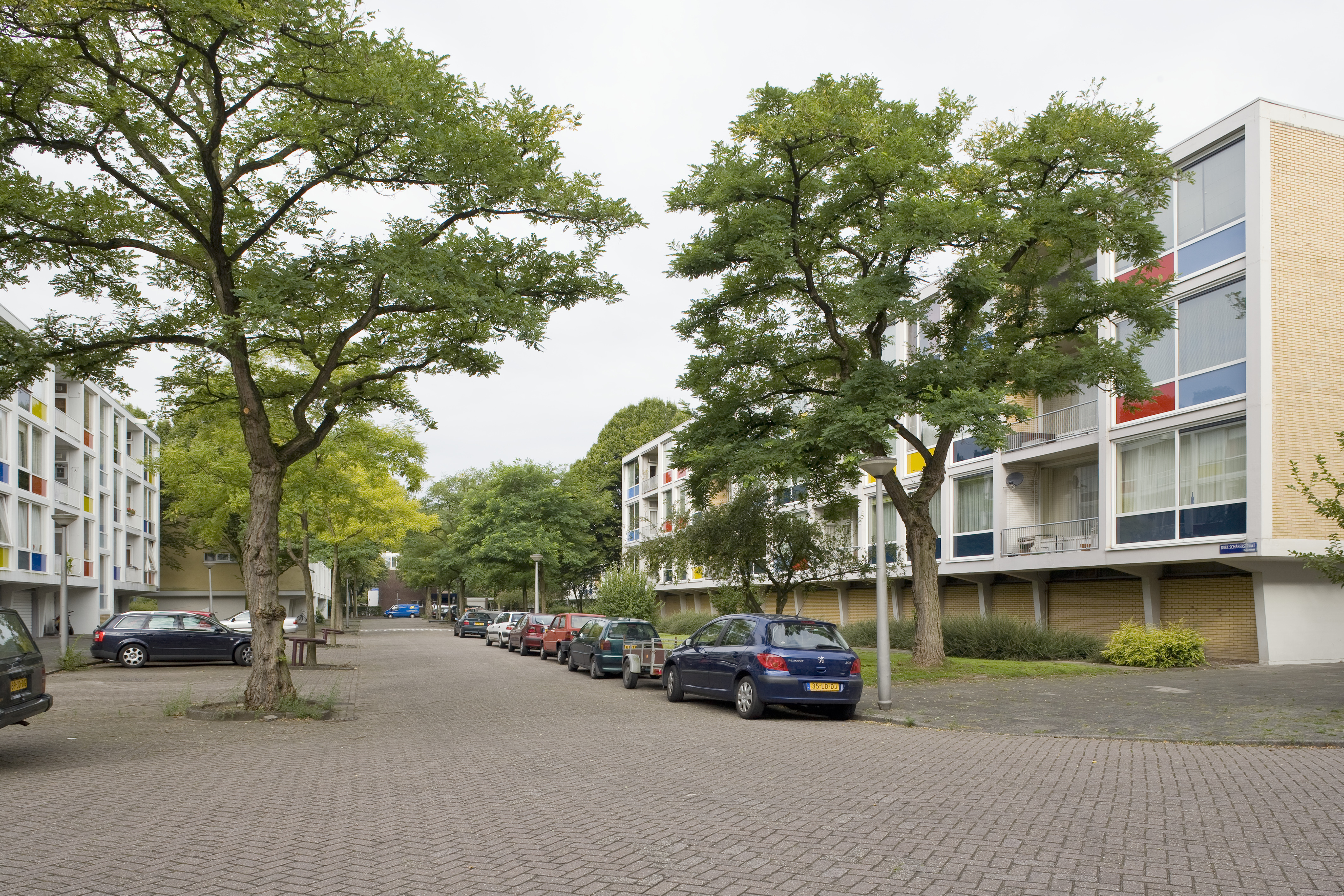 Warnersblokken: Overzicht van de woonblokken (opmerking: Gefotografeerd voor Monumenten van Herrezen Nederland) This is a possible Rijksmonument: Find the monument in the Monuments database: J.Worpstraat in Amsterdam All Rijksmonumenten in Amsterdam Is this a Rijksmonument? Yes No More information about this project and help. More images to work at in Category:Possible Rijksmonumenten.